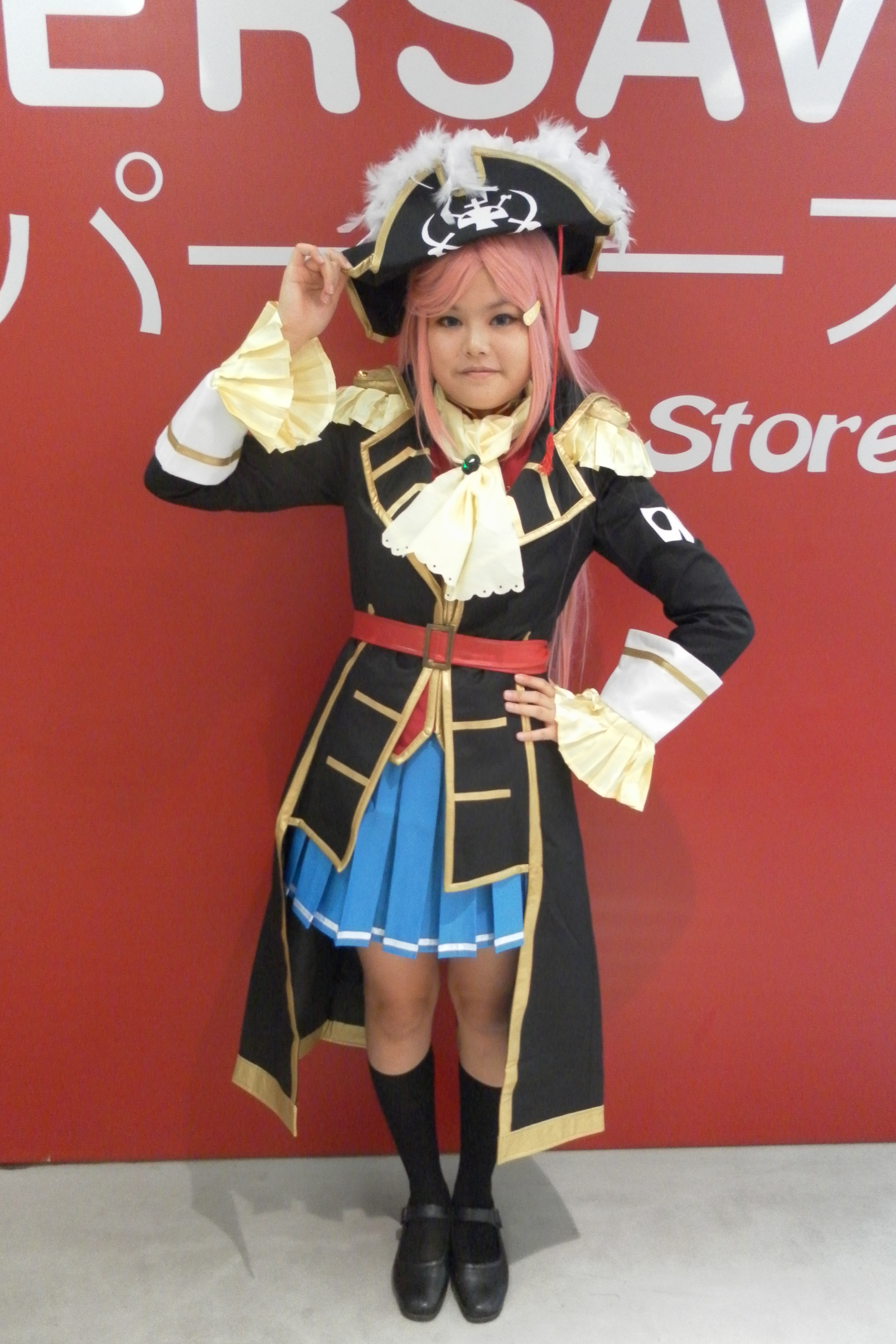 Marika Katou, Bodacious Space Pirates 加藤茉莉香、モーレツ宇宙海賊